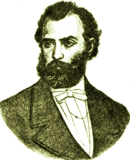 Al. Papiu-Ilarian (1828 - 1878)